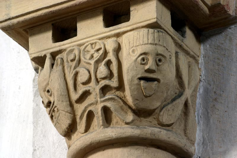 Chapiteau de l'église de Melay